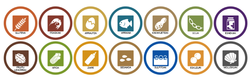 Alergeno ohikoen piktogramak, menuetan erabiltzeko